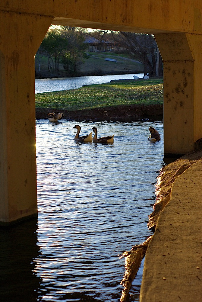 Under Main Street.